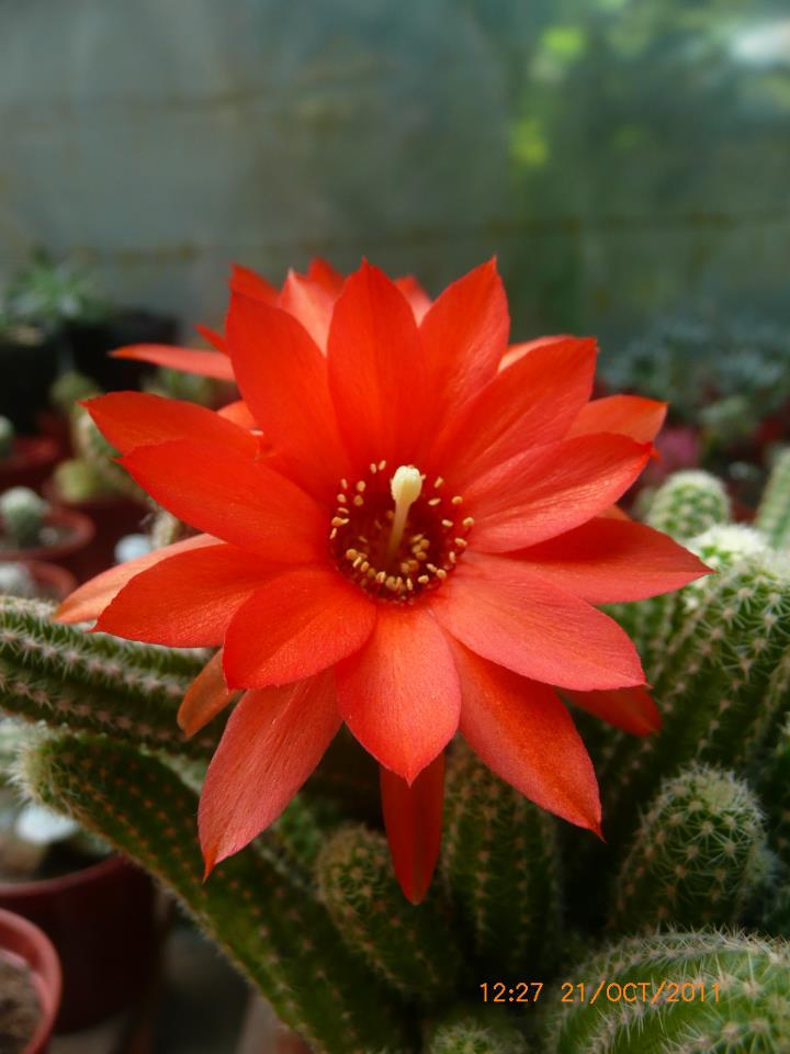 Un ejemplar puro Reino Plantae, Familia de Cactaceas, Género Echinopsis Chamaecereus Silvestri, endémico de Tucumán y Santiago del Estero (Argentina)